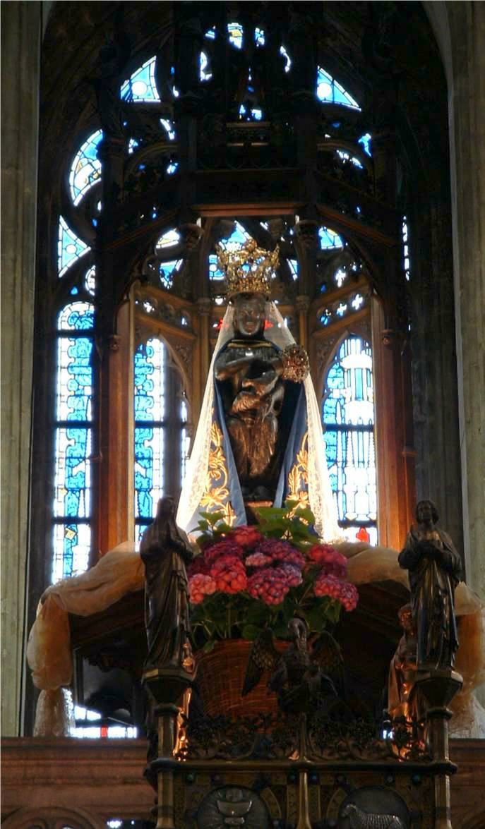 Goto Guy Debognies 28 juni 2005